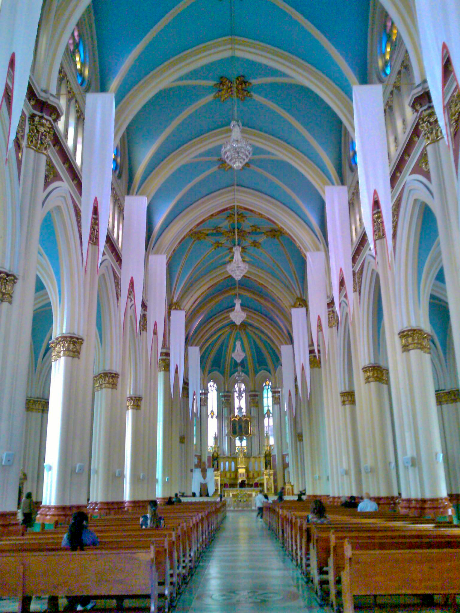 Nave central de la Iglesia de Chiquinquira en Bogotá